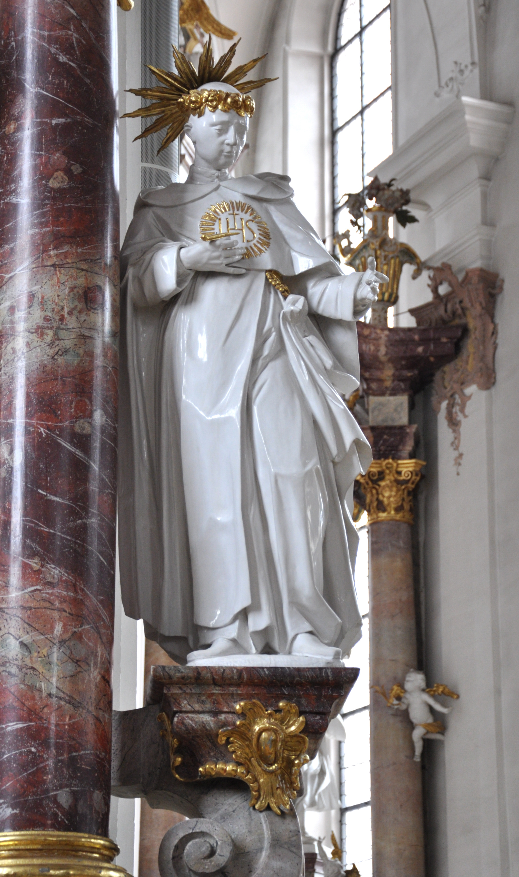 Rottweil, Predigerkirche, Statue Heinrich Seuse